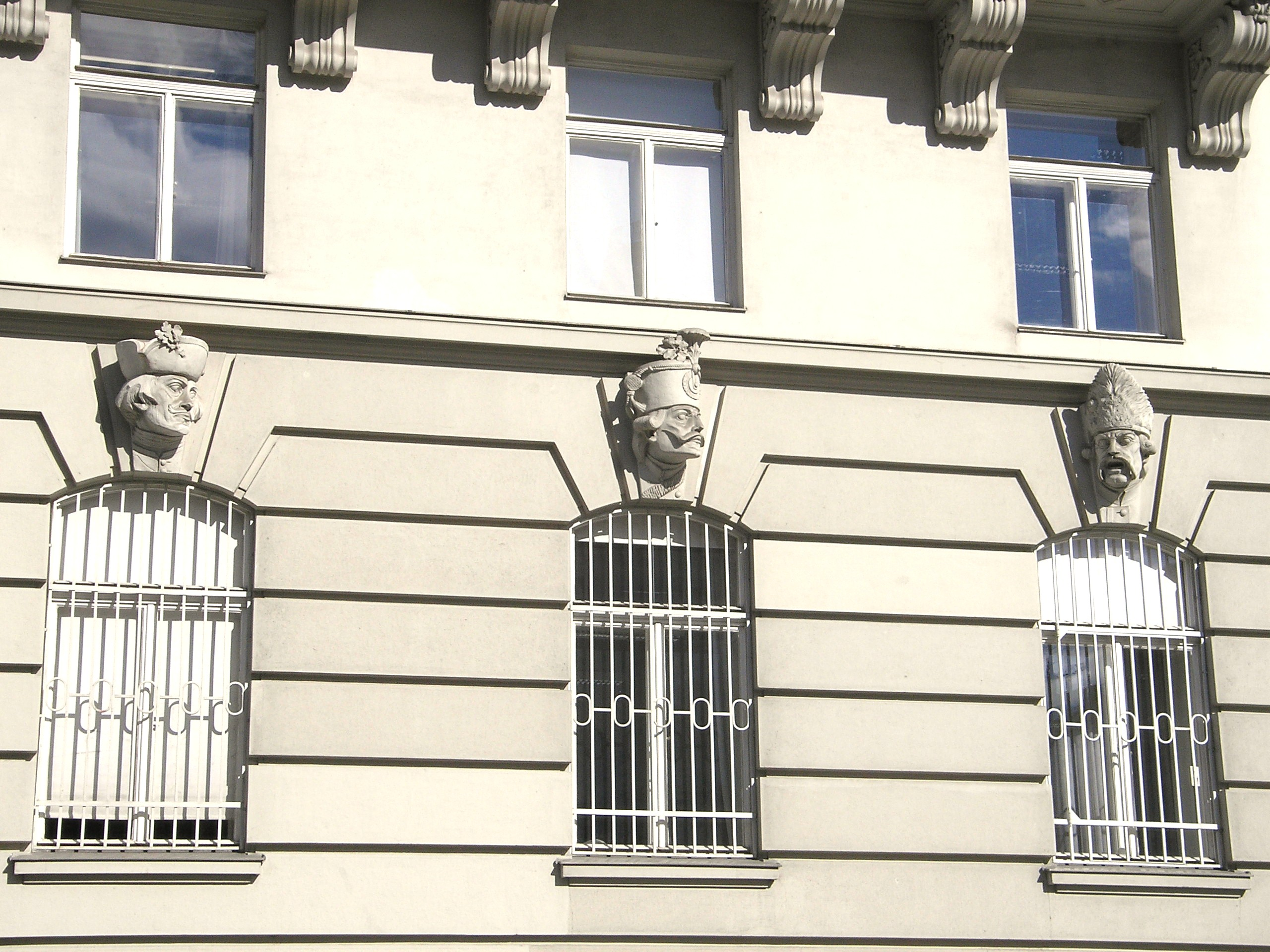 The Regierungsgebäude in Vienna, the former Imperial and Royal Ministry of War (Kriegsministerium).